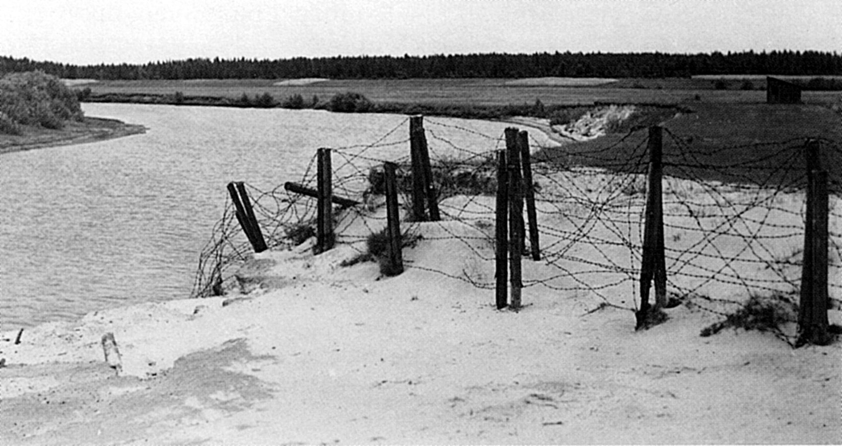 Граница СССР и Эстонии по реке Россонь. Вид с советской строны.